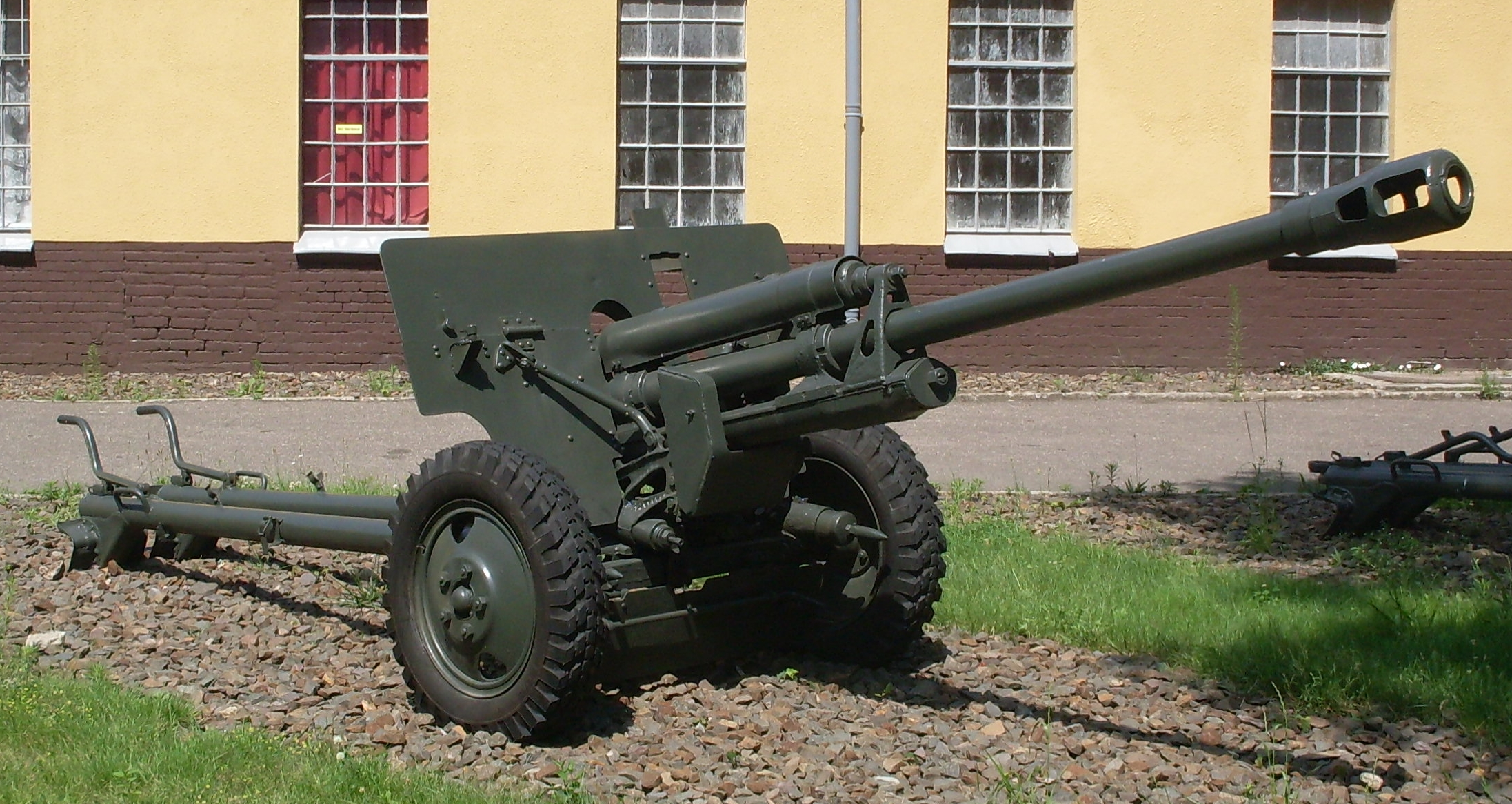 armata ppanc ZiS 3 w CSWLąd w Poznaniu